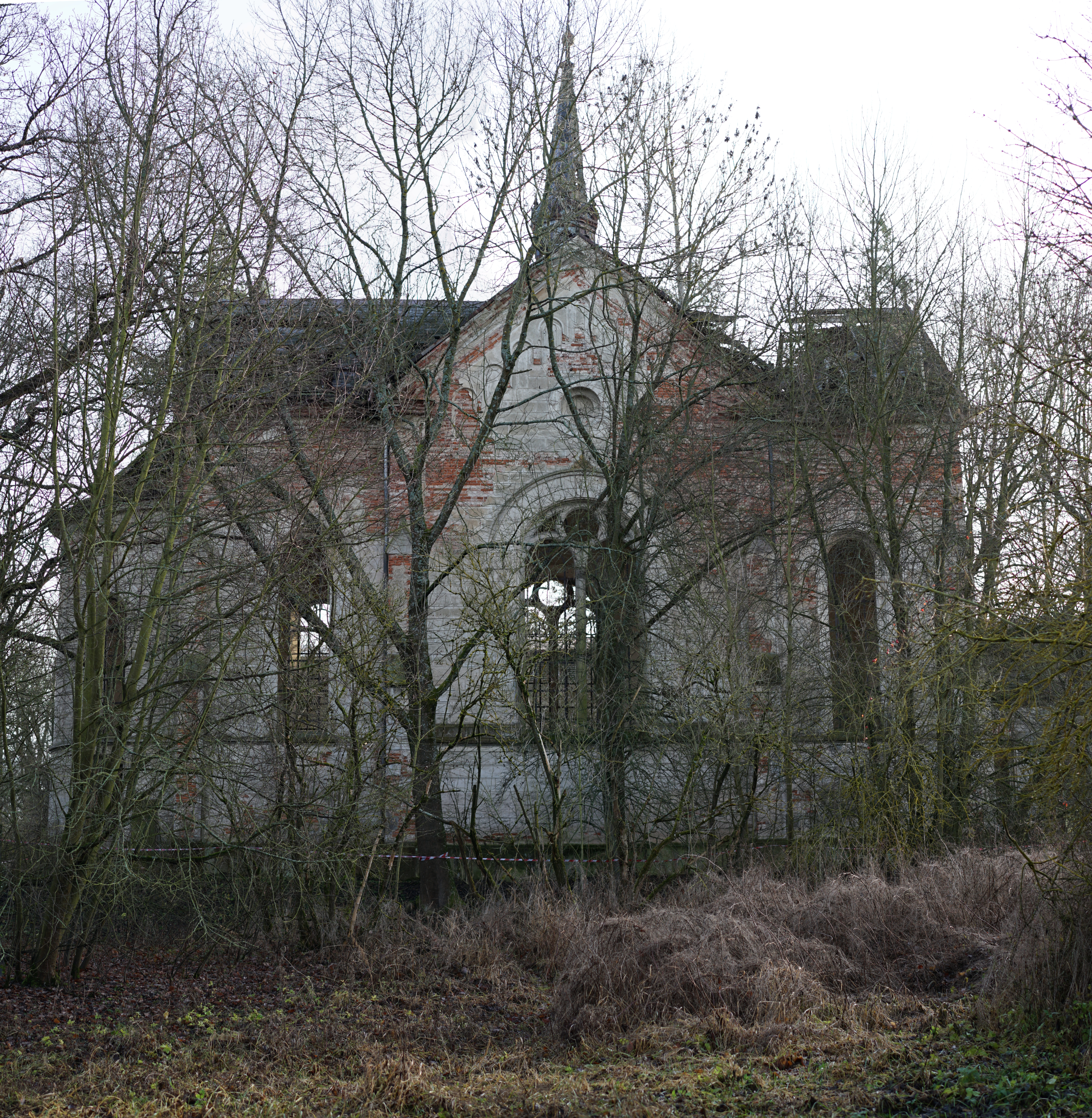 Pohled na severní stranu kaple sv. Anny v prosinci 2019.